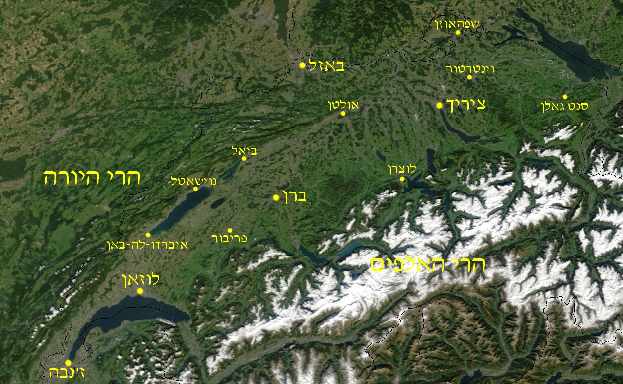 צילום לוויין של השפלה השווייצרית